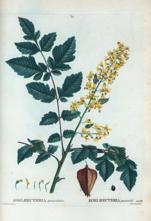 7 v. : 498 col. pl. ; 42 cm.